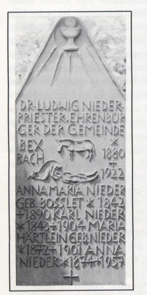 Epitaph, Dr. Ludwig Nieder, Speyer, Bexbach